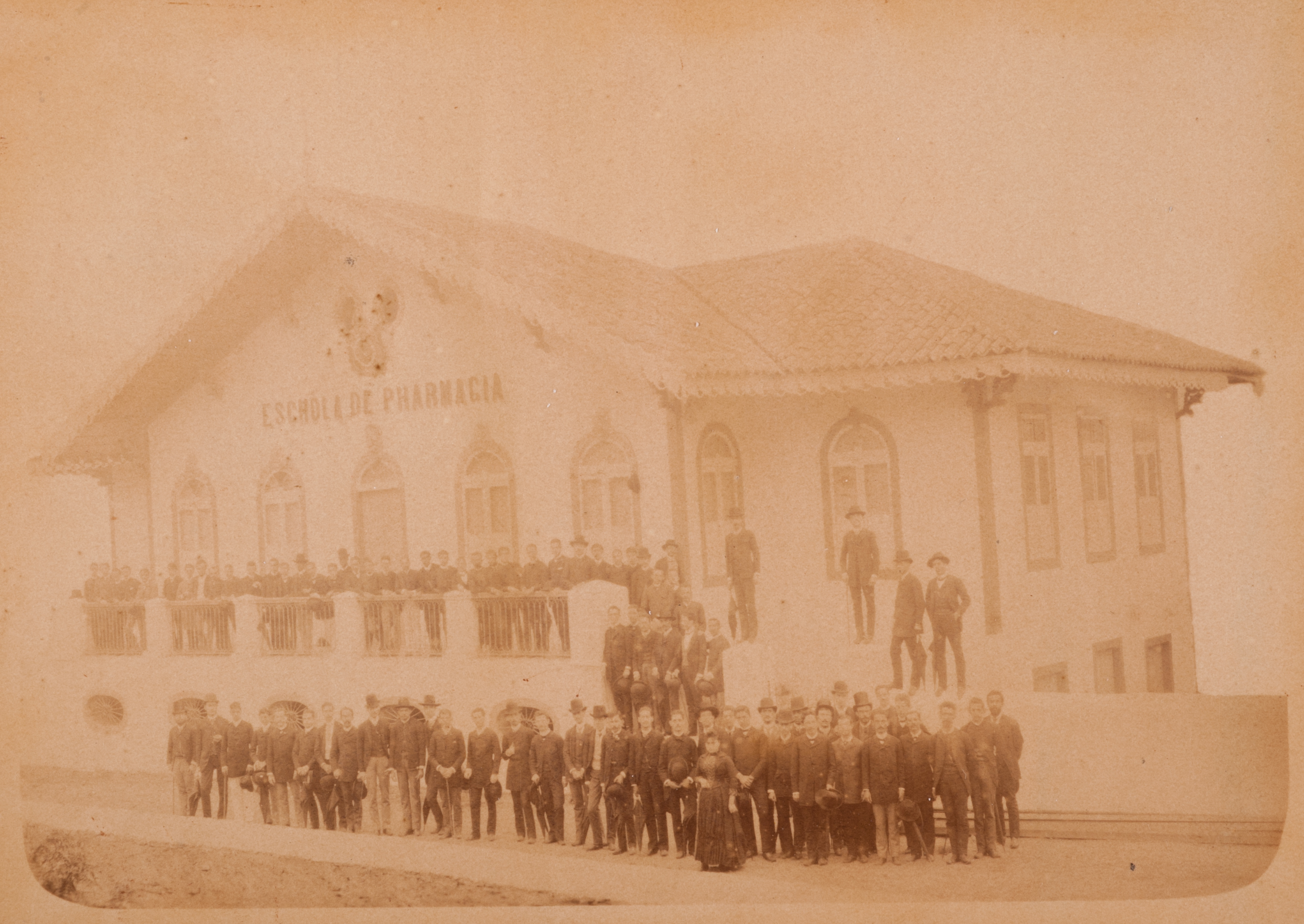 Obra que integra o acervo do Museu Paulista da USP. Coleção Carlos Eugênio Marcondes de Moura. Reg. Agente: Moreira, Roltgen & Teixeira Retratistas. Rua Dos Ourives, 38.